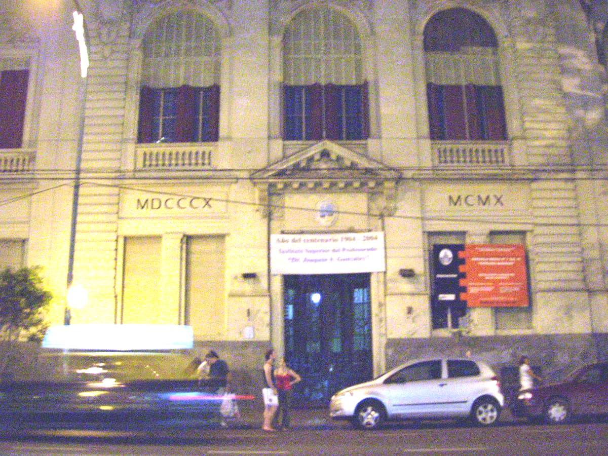 Colegio Mariano Moreno, en el barrio de Almagro. Buenos Aires